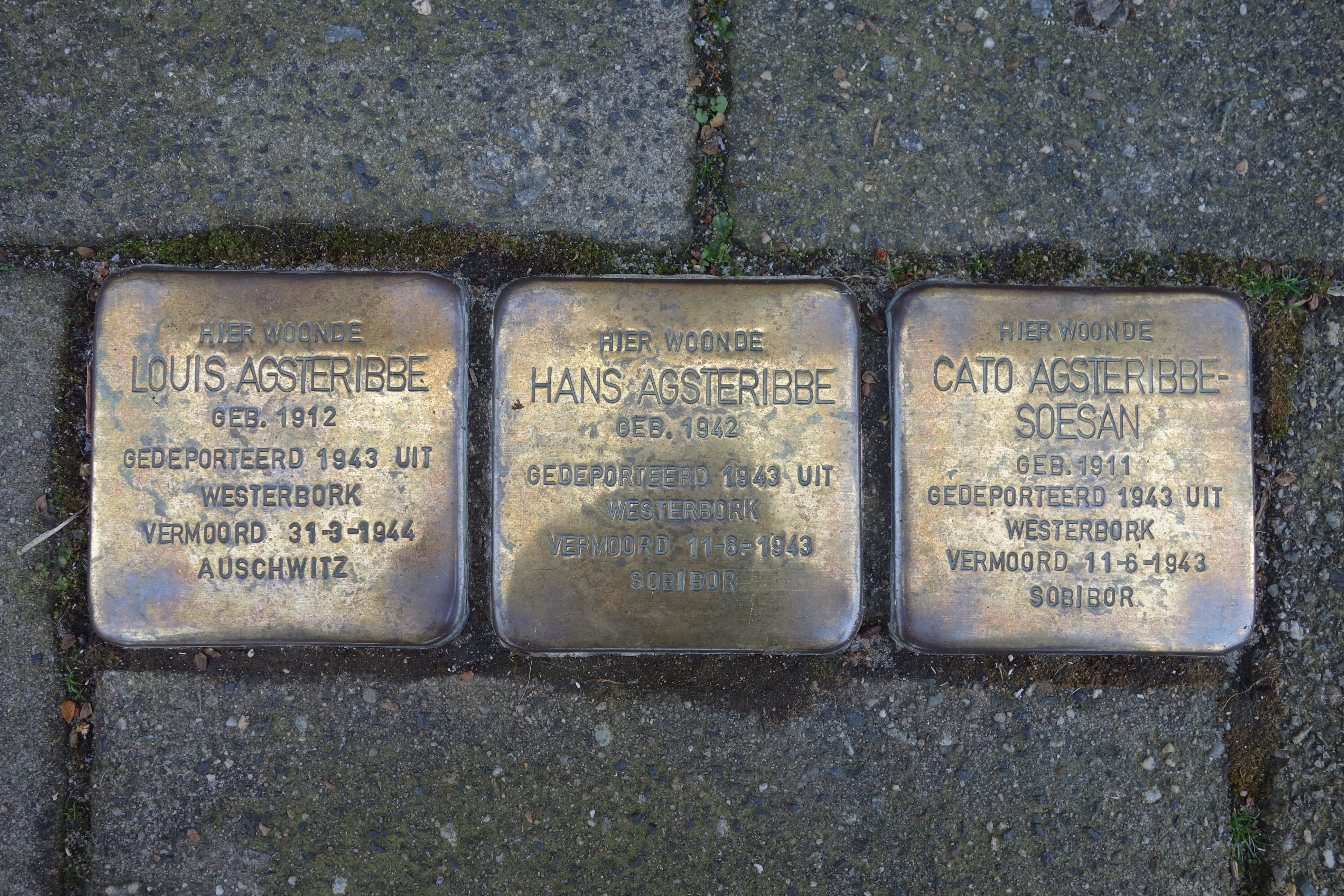 Drie stolpersteine voor Beatrixlaan 3. Stenen zijn voor Louis Agsteribbe, zijn vrouw Cato Agsteribbe-Soesan en hun zoontje Hans Agsteribbe. Cato was 8 maanden zwanger toen ze opgepakt werden. Alle drie zijn in Sobibor omgekomen. (locatie is bij benadering)